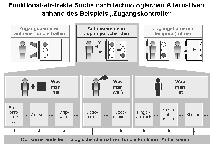 Funktionalmarkt-Konzept nach Pfeiffer anhand des Beispiels Zugangskontrolle; Technologische Alternativen zum mechanischen Schlüssel, Technologiefrüherkennung